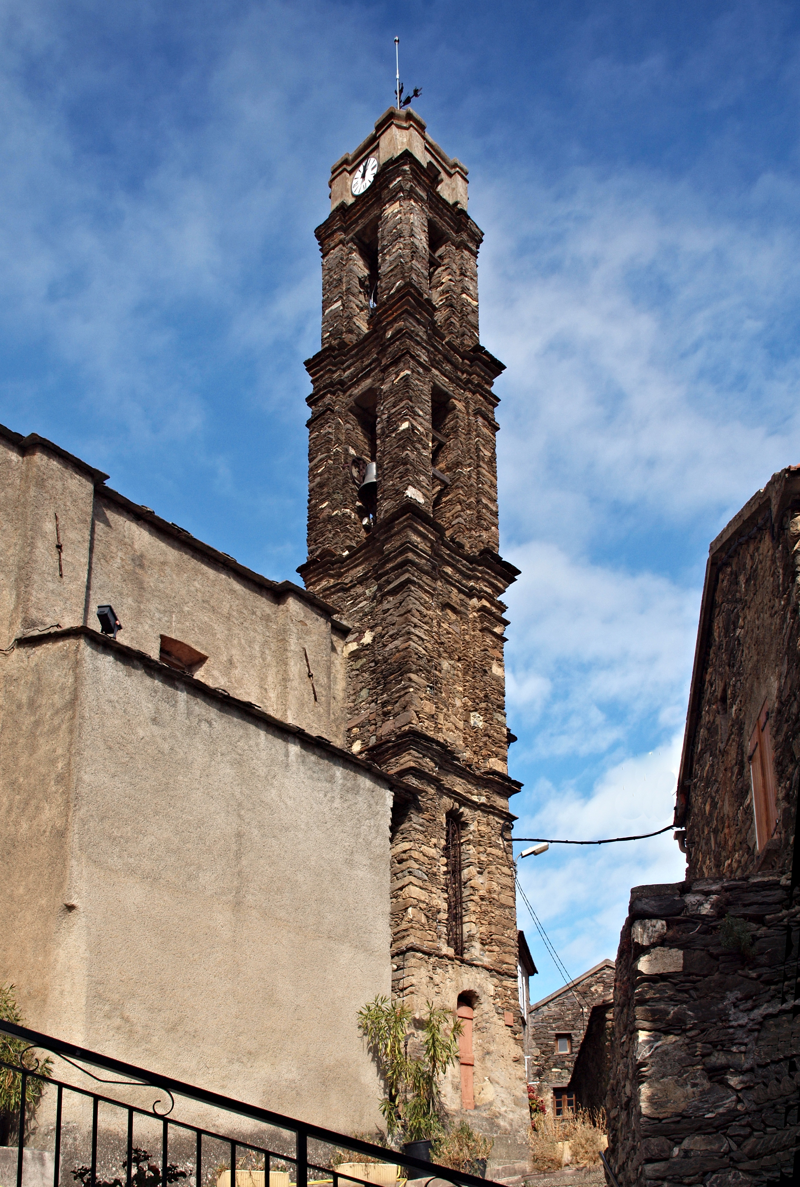 Rusio, Casaluna (Corse) - Clocher de l'église Sainte-Marie (Santa Maria Assunta)